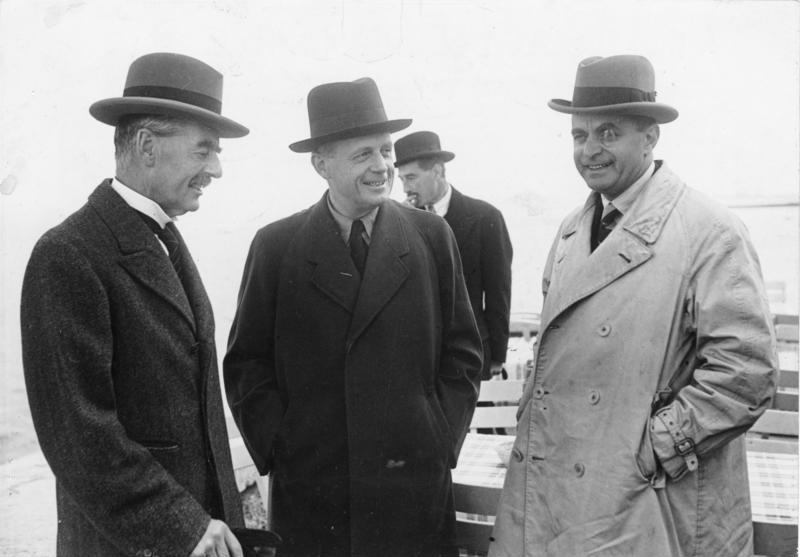 Scherl-Text: Ministerpräsident Chamberlain in Deutschland. Am Freitag kehrt der englische Premierminister nach seinem Besuch auf dem Obersalzberg im Wagen nach München zurück, um von dort aus den Heimflug anzutreten. Unterwegs machte Ministerpräsident Chamberlain in dem Autobahn-Rasthaus am Chiemsee halt. UBz: von links: Premierminister Chamberlain, Reichsminister des Auswärtigen von Ribbentrop im Gespräch mit dem bekannten englischen Journalisten Ward Price. Im Hintergrund der englische Botschafter in Berlin Henderson. Scherl Bilderdienst Berlin 16.9.1938 1285-38 12285-38 [2. Text] Zentralbild, 15.9.1938 Der britische Ministerpräsident, Neville Chamberlain, besichtigt nach dem Besuch bei Adolf Hitler auf dem Berghof (Berchtesgaden) das Autobahn-Rasthaus am Chiemsee. V.l.n.r.: Neville Chamberlain, der deutsche Reichsaußenminsiter Joachim von Ribbentrop, der englische Botschafter in Berlin, Neville Henderson und der englische Journalist Price. 12285-38